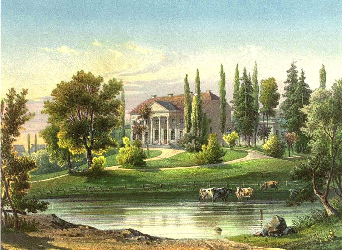 Gut Neudörfchen, Lithografie aus dem 19. Jahrhundert